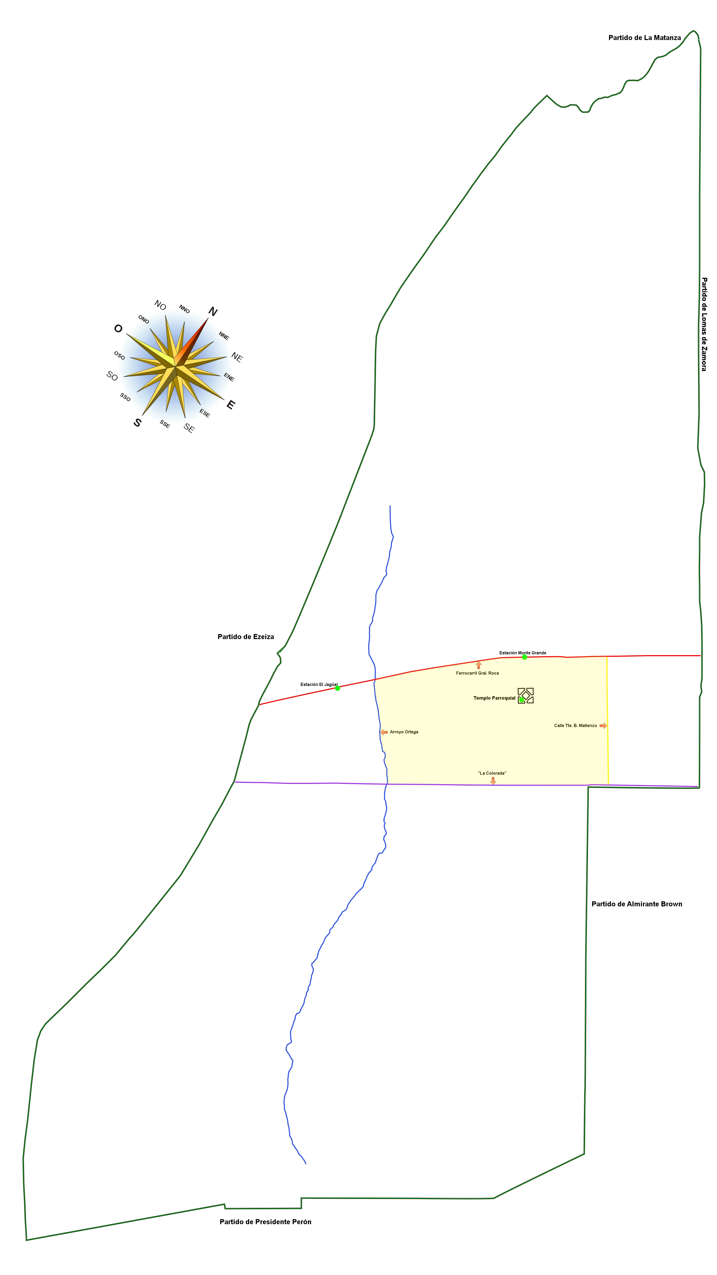 Territorio que comprende la Parroquia Inmaculada Concepción de Monte Grande